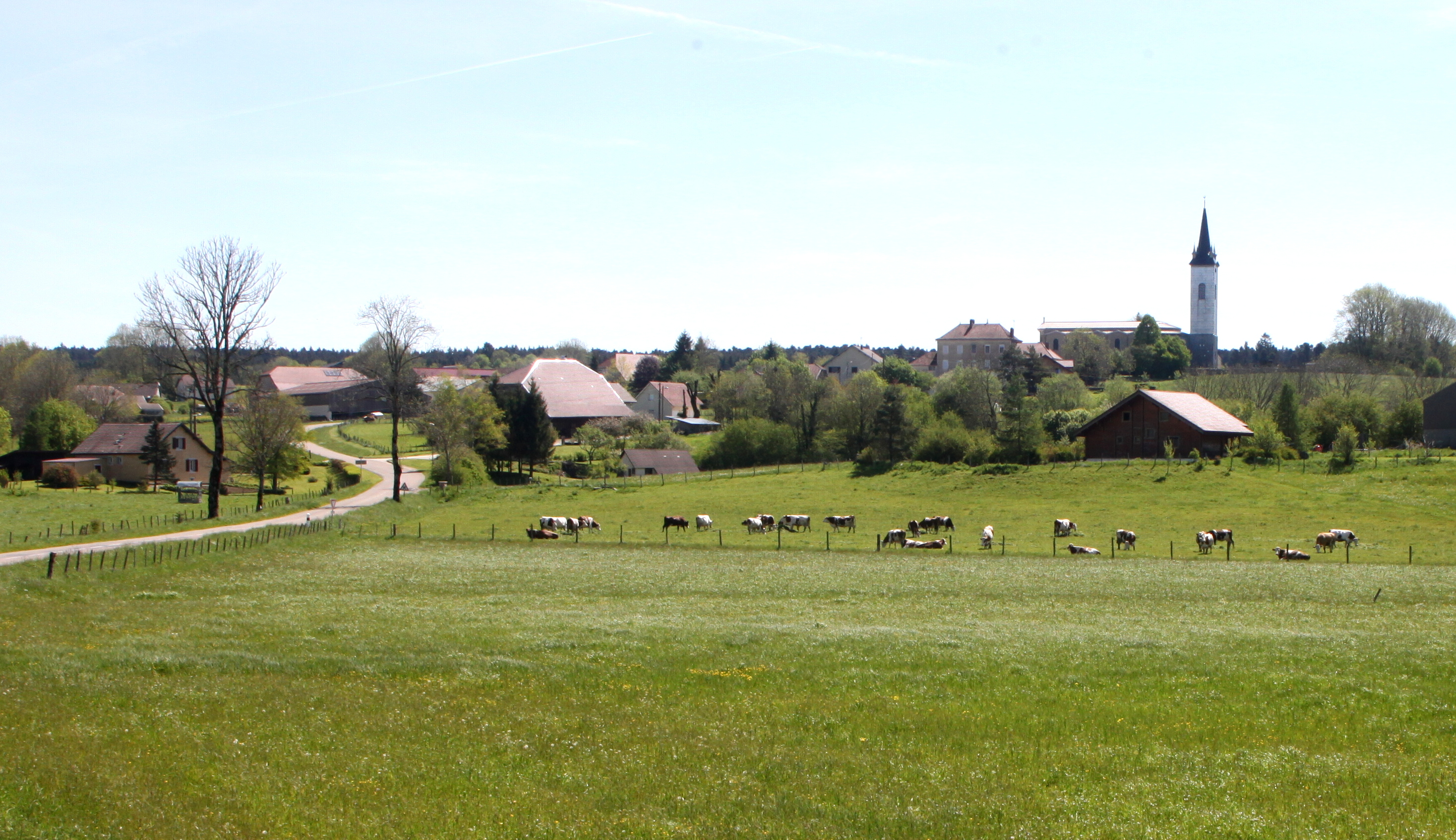 Vue d'Arc-sous-Montenot (Doubs).